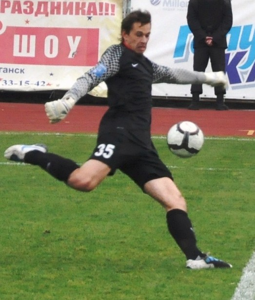 Богдан Шуст — украинский футболист.